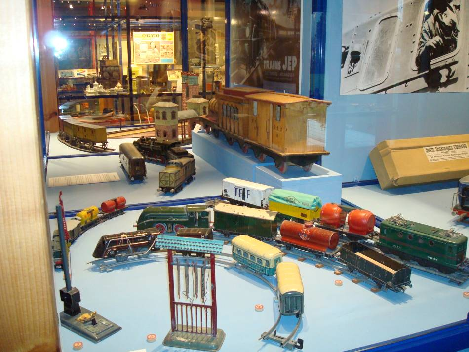 Une des vitrines du musée du jouet de Moirans-en-Montagne